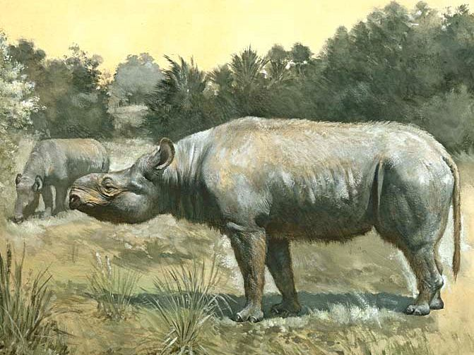 Subhyracodon (Caenopus).